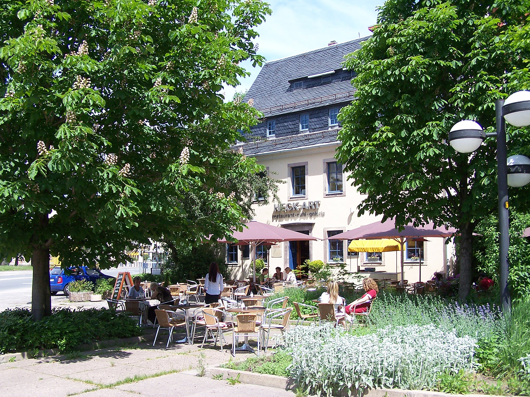 Geburtshaus von Fritz Heckert ist heute Galerie und Restaurant Heck-ART :Kategorie:Chemnitz